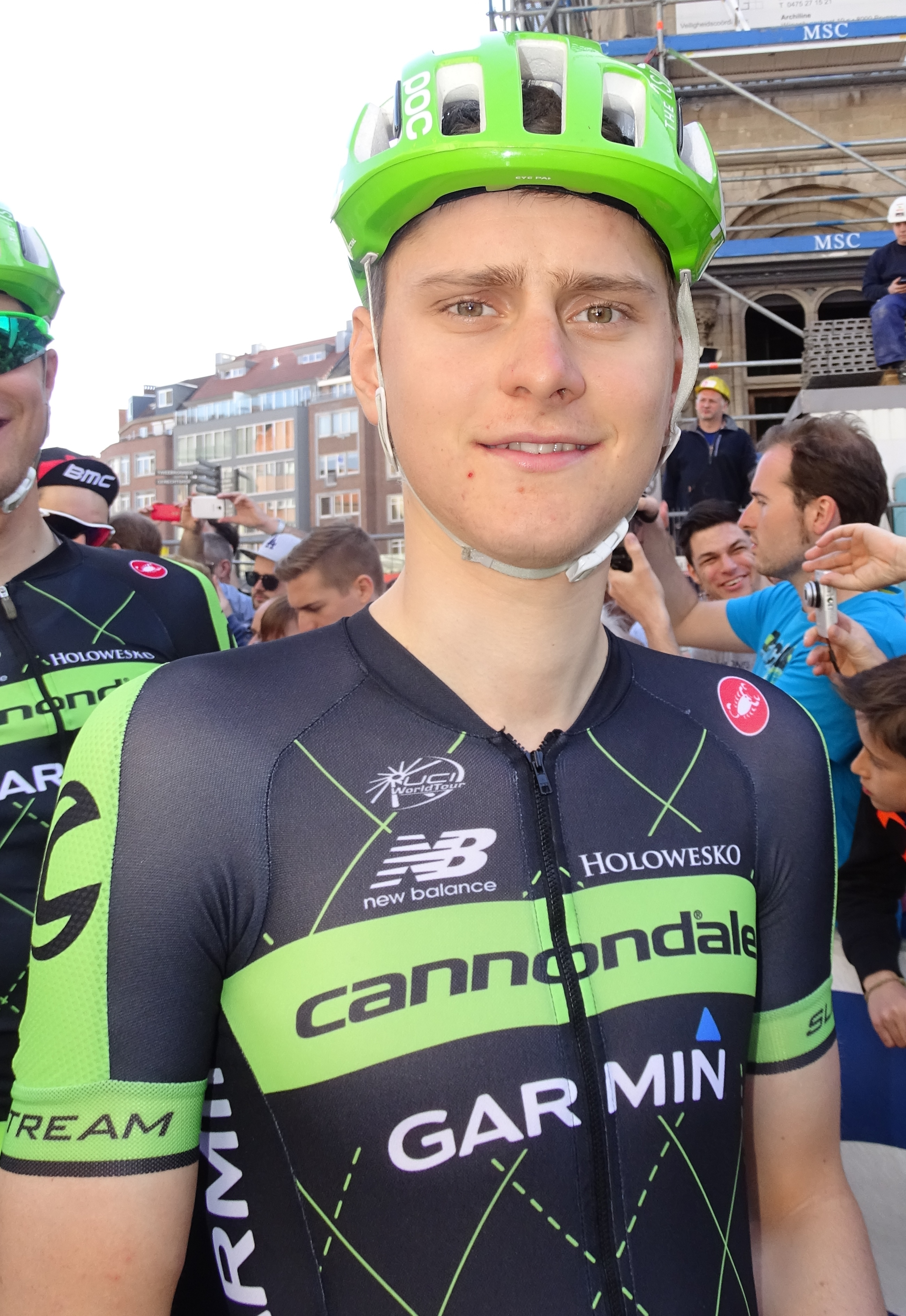 Reportage réalisé le mercredi 15 avril à l'occasion du départ de la Flèche brabançonne 2015 à Louvain, Belgique.